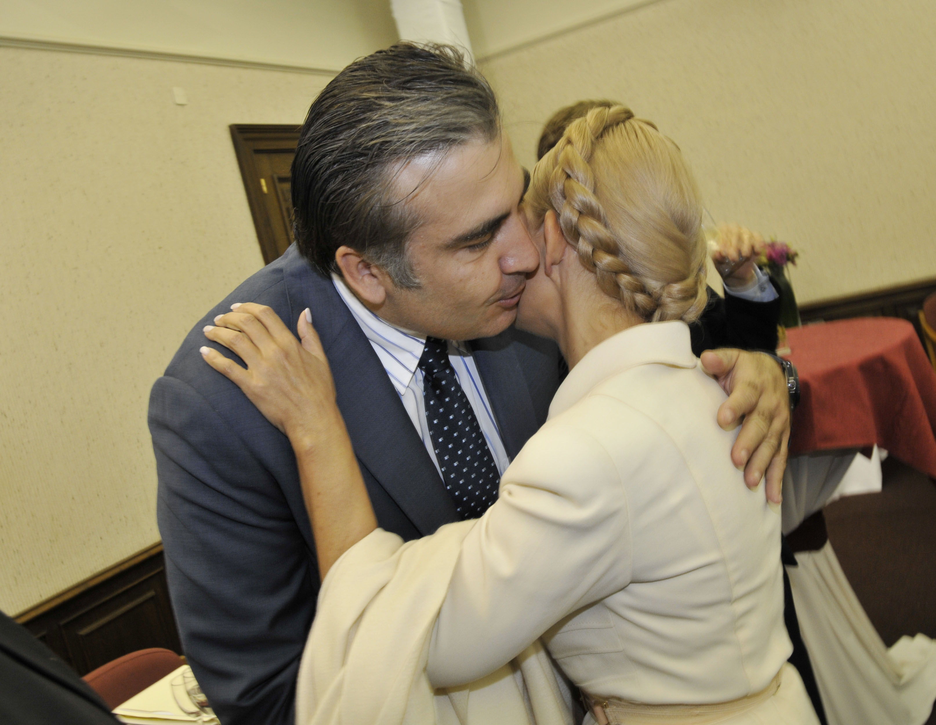 Mikheil Saakashvili at EPP Summit September 2010